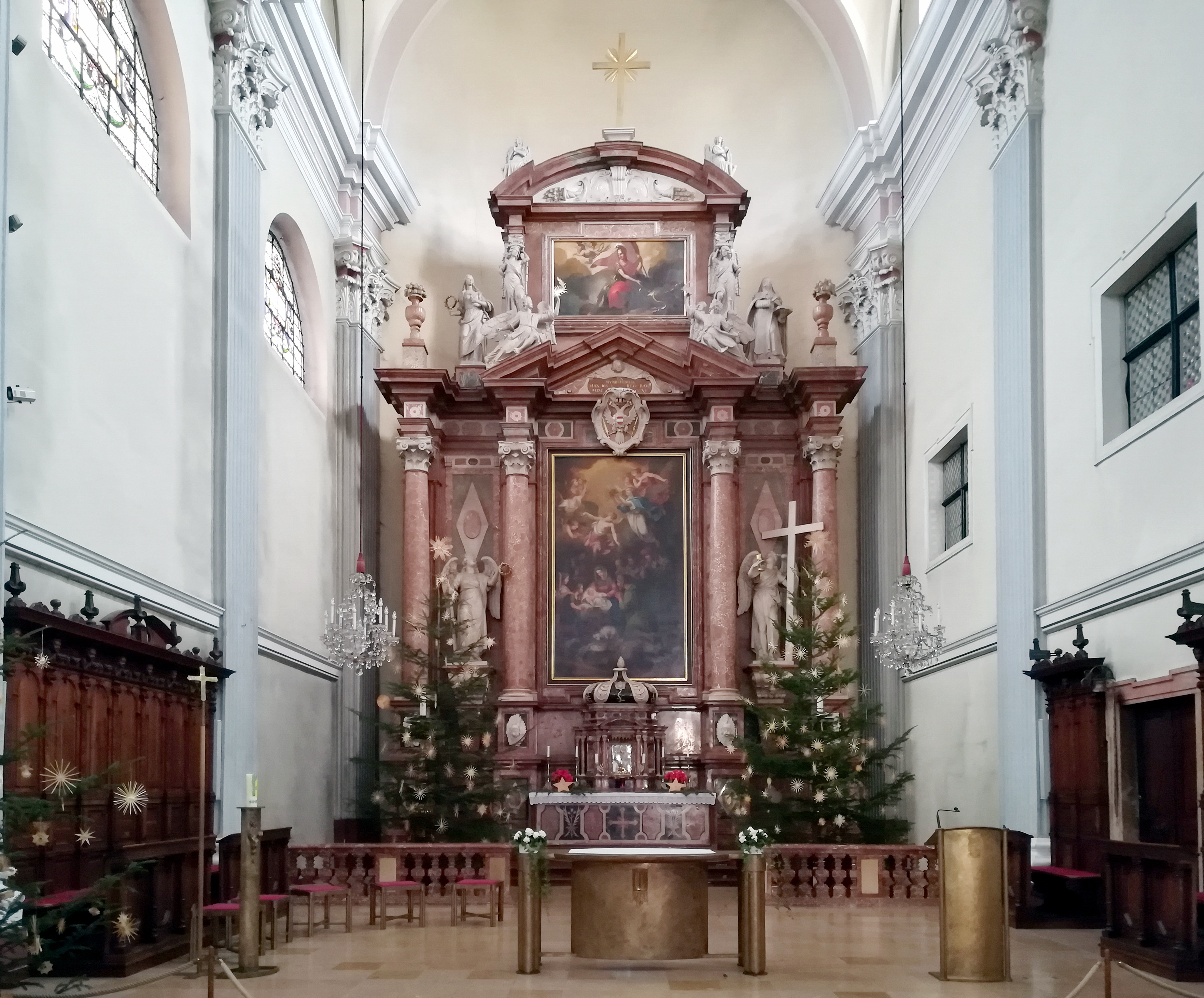 Die Stadtpfarrkirche Schärding befindet sich in der Stadt Schärding im gleichnamigen Bezirk Schärding von Oberösterreich (Kirchengasse 6). Sie ist dem Hl. Georg geweiht.